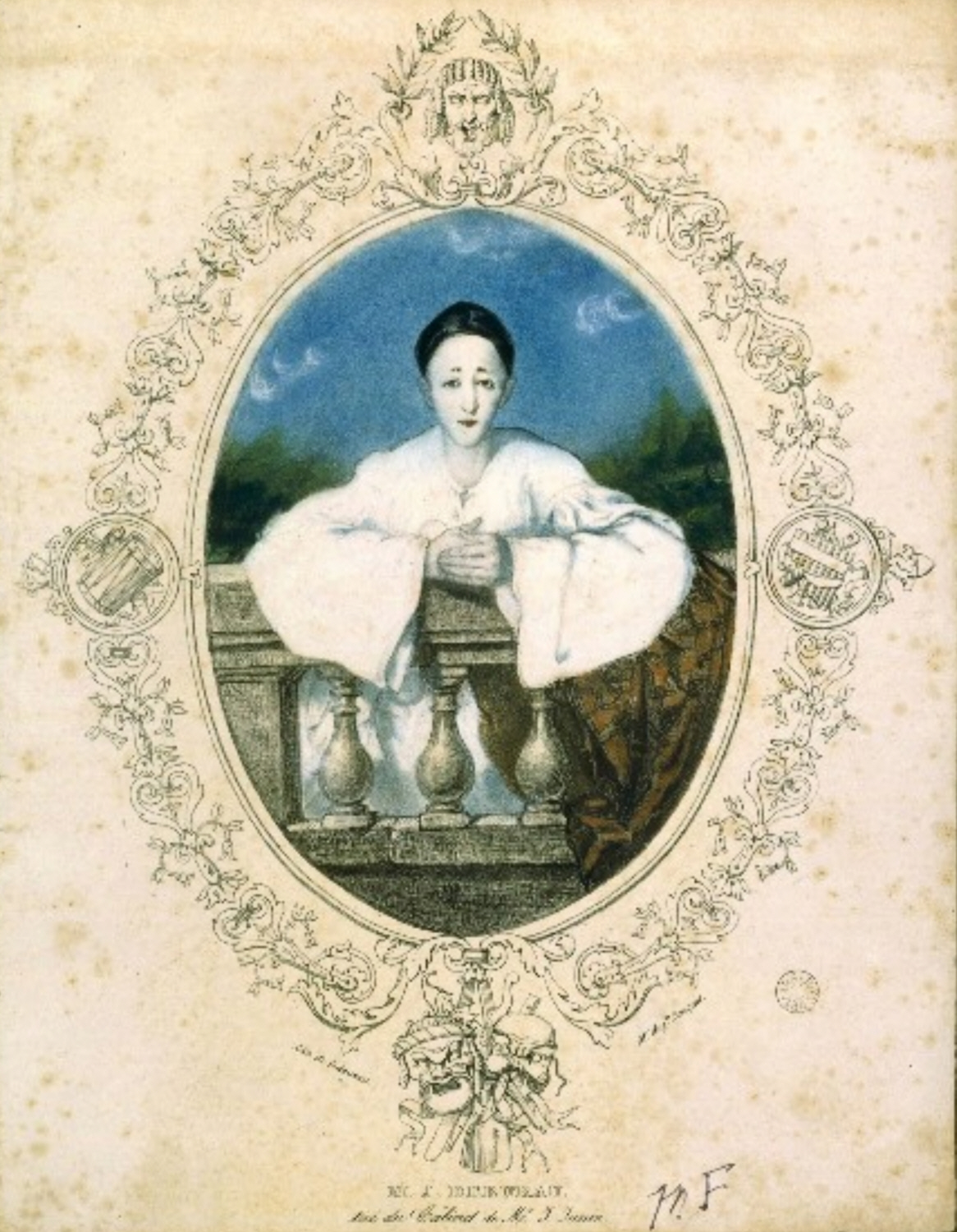 Jean-Gaspard Deburau (1796-1846), französischer Pantomime. Zwischen 1840 und 1870 entstandene Lithographie der Druckerei Delaunois in Paris.